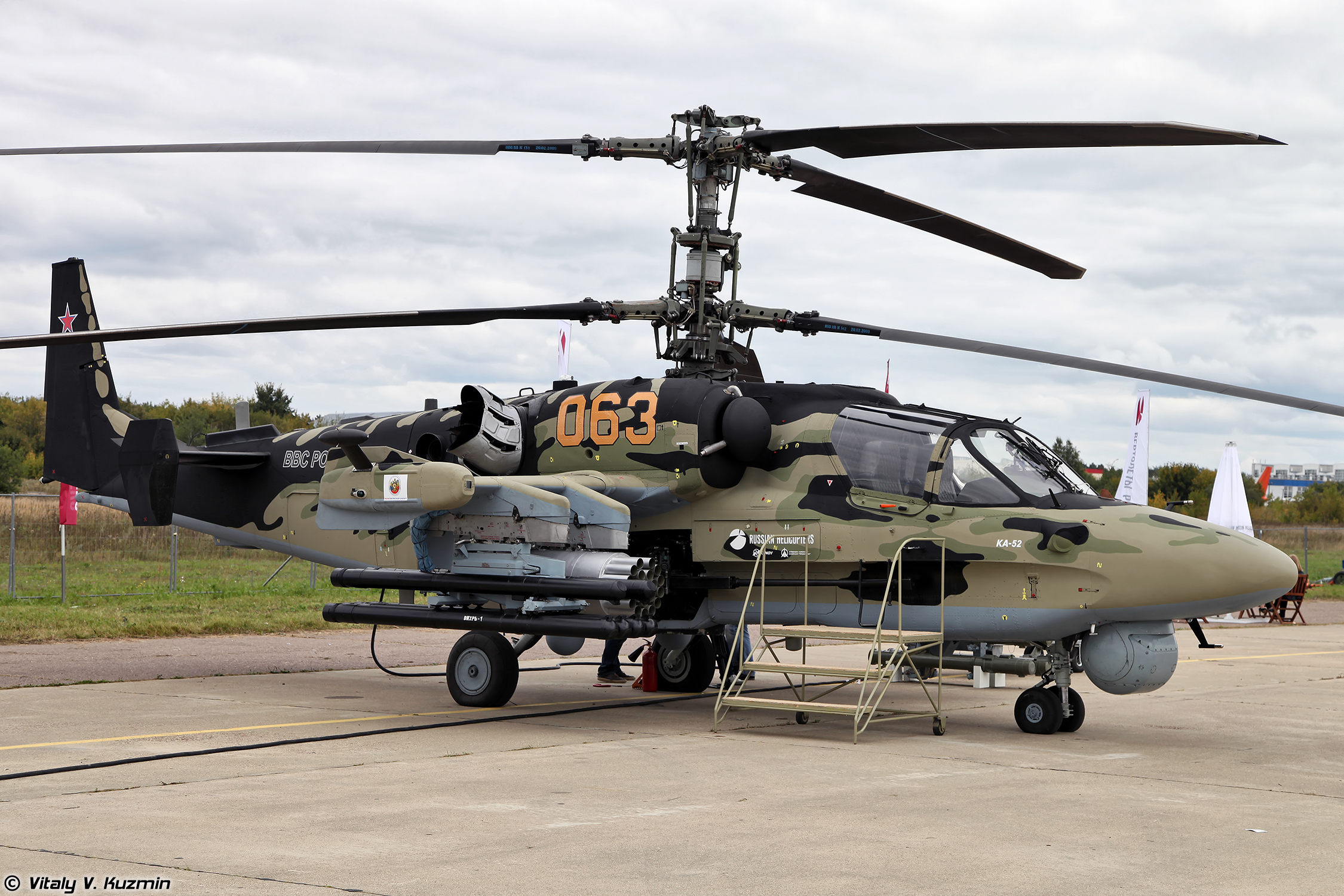 Еще один Ка-52 со стоянки ОАО «Вертолёты России» (One more Ka-52)